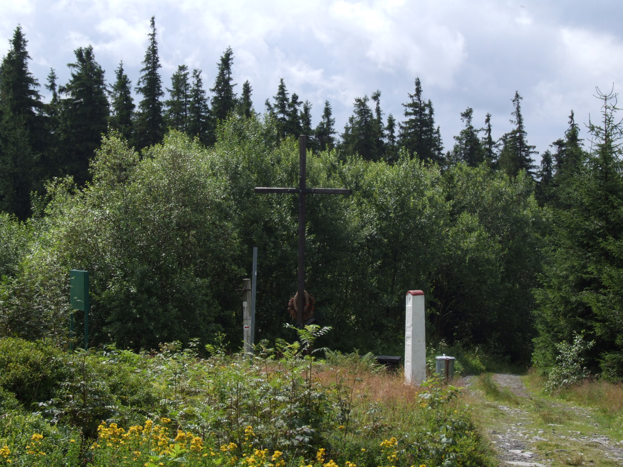 Ruiny schroniska „Rudolfsheim“ i Przejście graniczne Jarnołtówek (Biskupia Kopa)-Zlaté Hory (Biskupská Kupa)